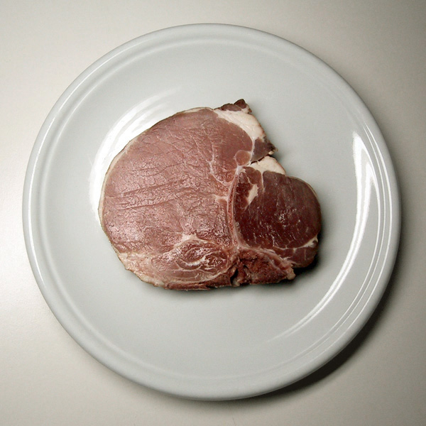 Kasseler Kotelett - smoked and pickled pork.